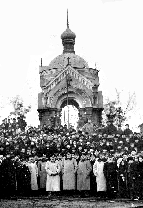 Каплиця на території Луганського патронного заводу